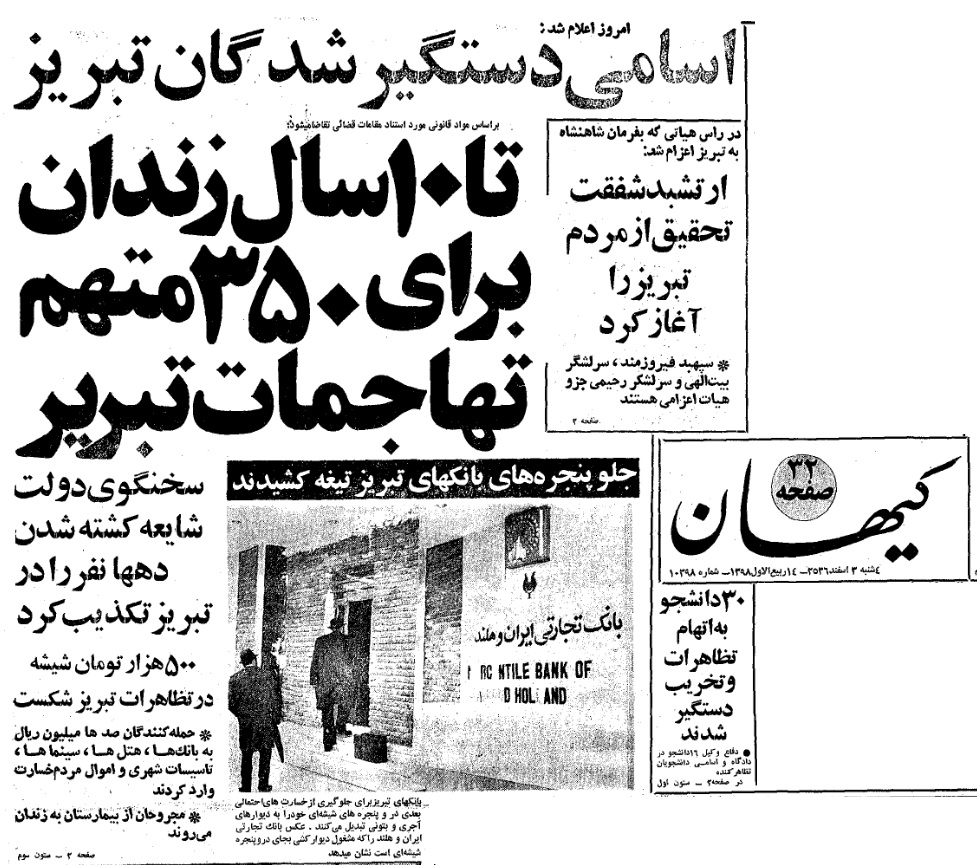 صفحه نخست روزنامه کیهان در 3 اسفند 1356 که کاملا به حوادث 29 بهمن تبریز پرداخته است.